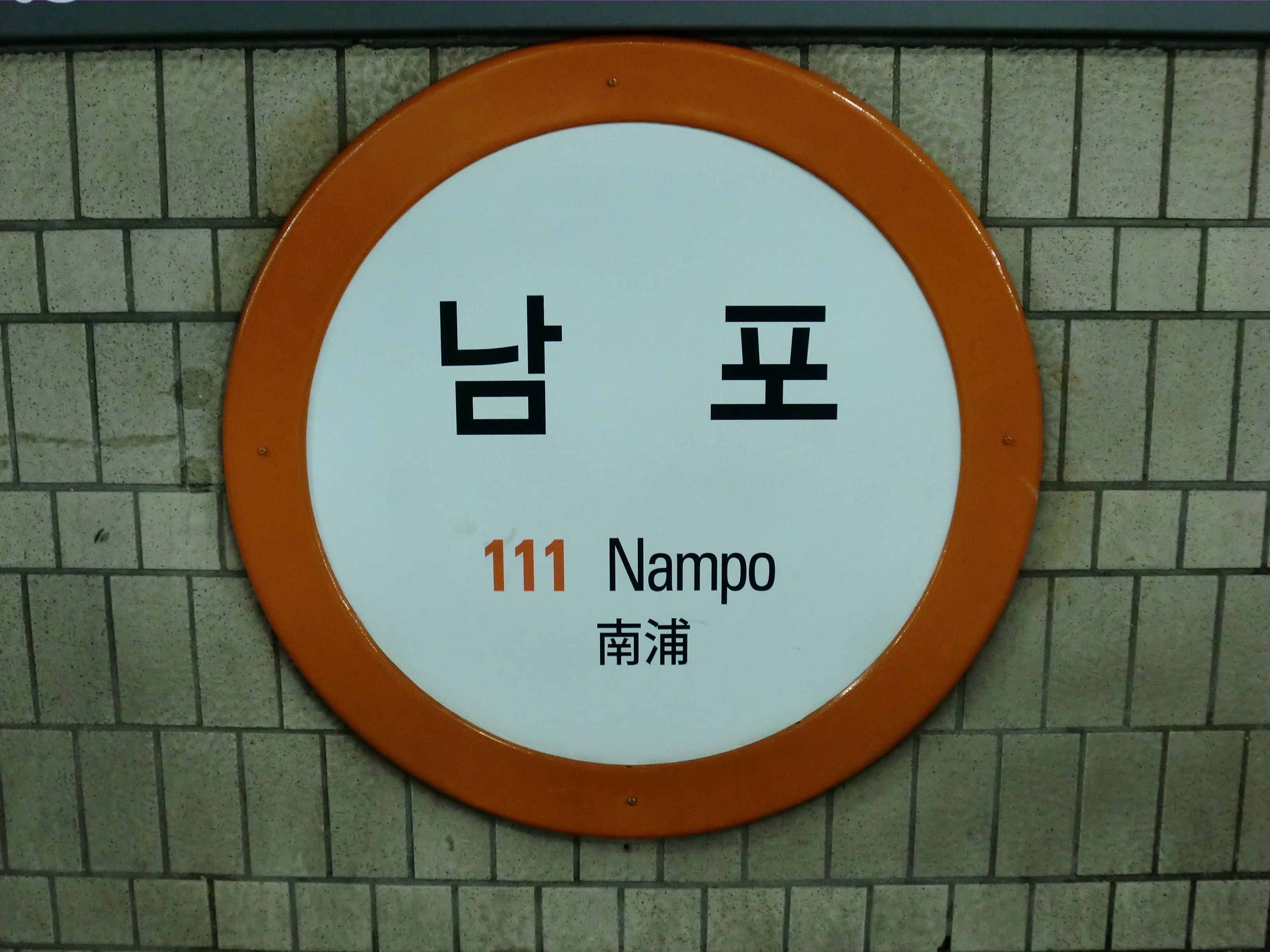 부산도시철도 1호선 남포역의 역명판